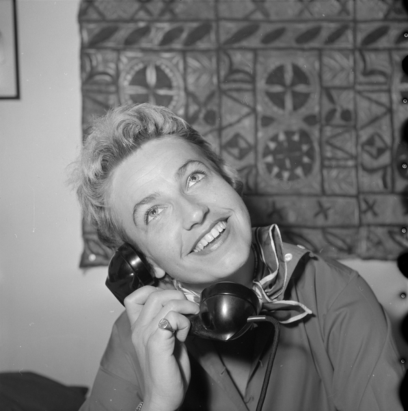 Kirsten Sørlie, norsk skådespelare och regissör.